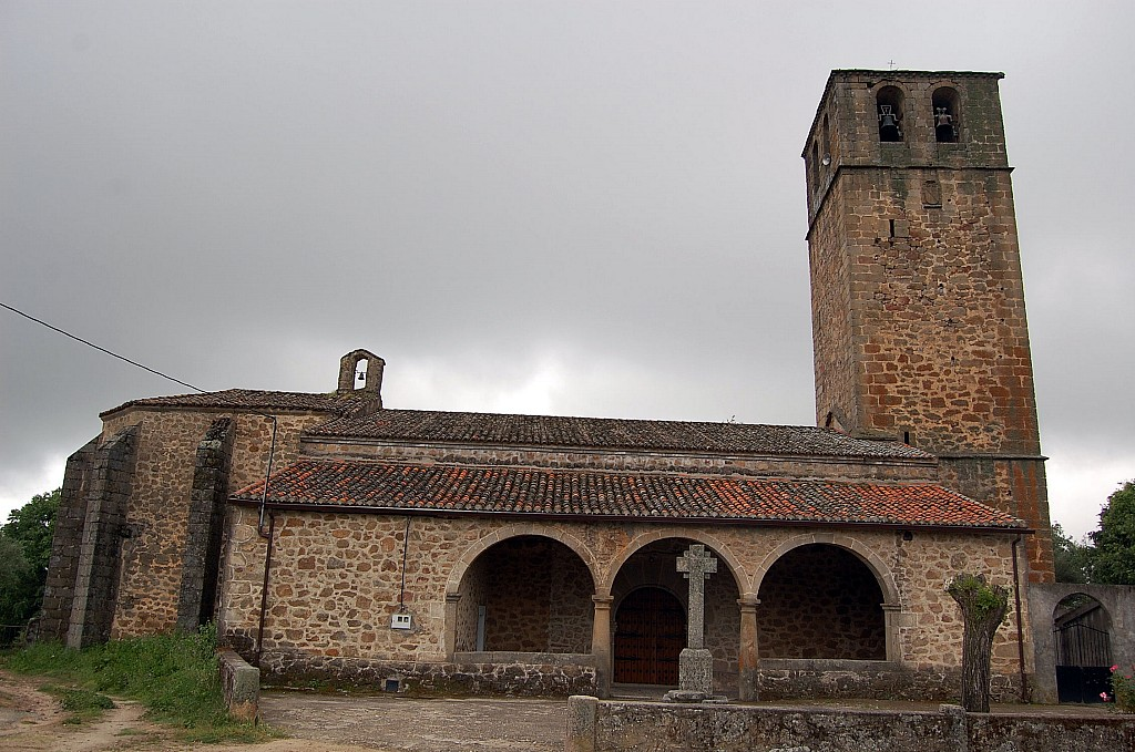 Iglesia de Gargüera, provincia de Cáceres, España